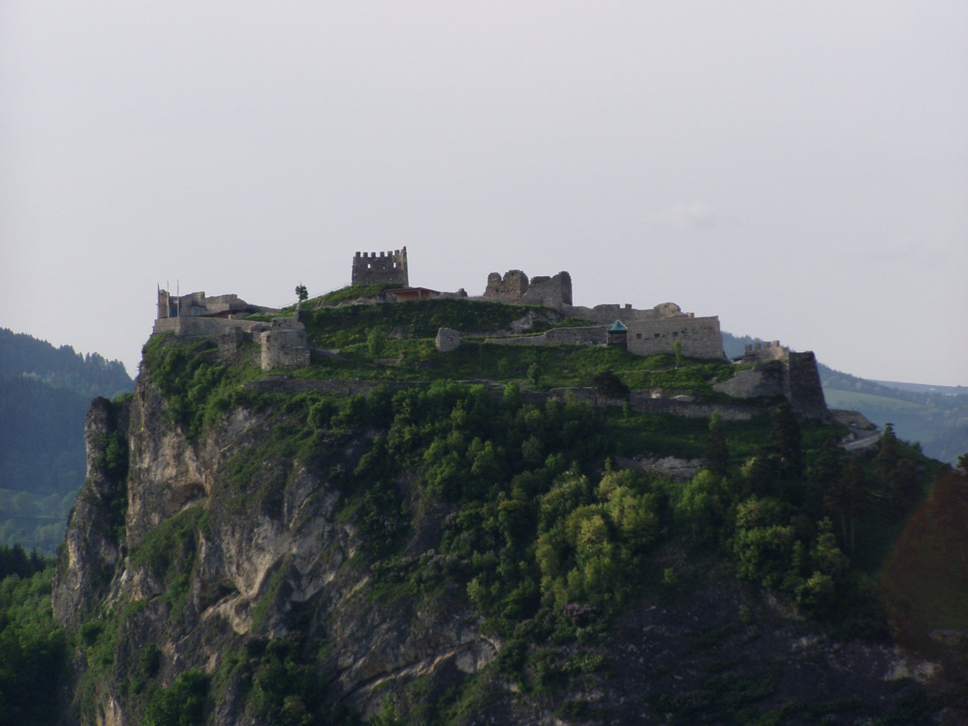 Burgruine Griffen, Carinthia